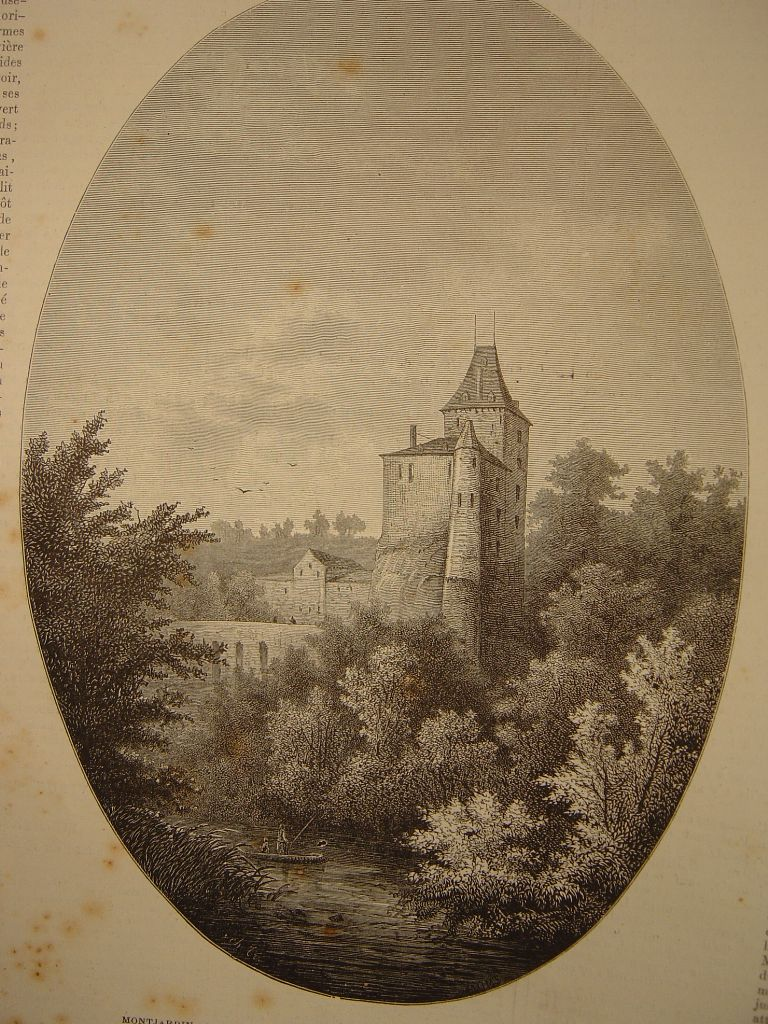 Montjardin , bords de l'Amblève par Ch. Trumper